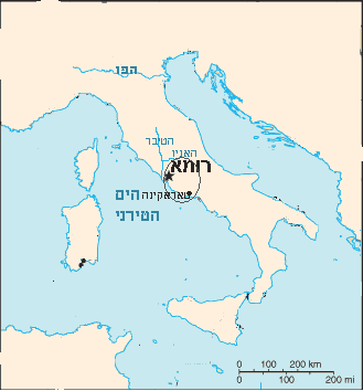 מפה משוערת של לטניום